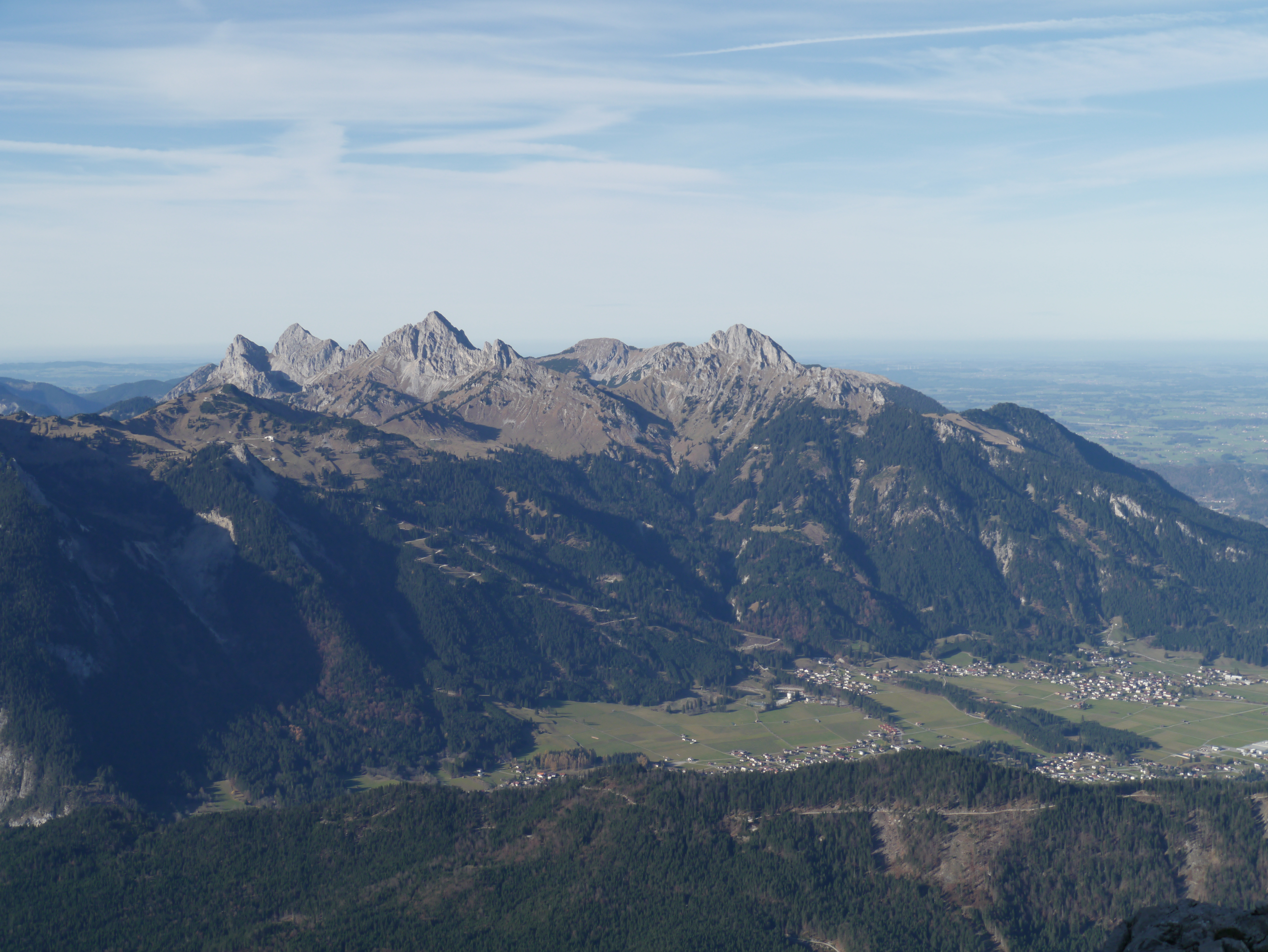 Blick vom Thaneller übers Lechtal auf die Tannheimer Berge